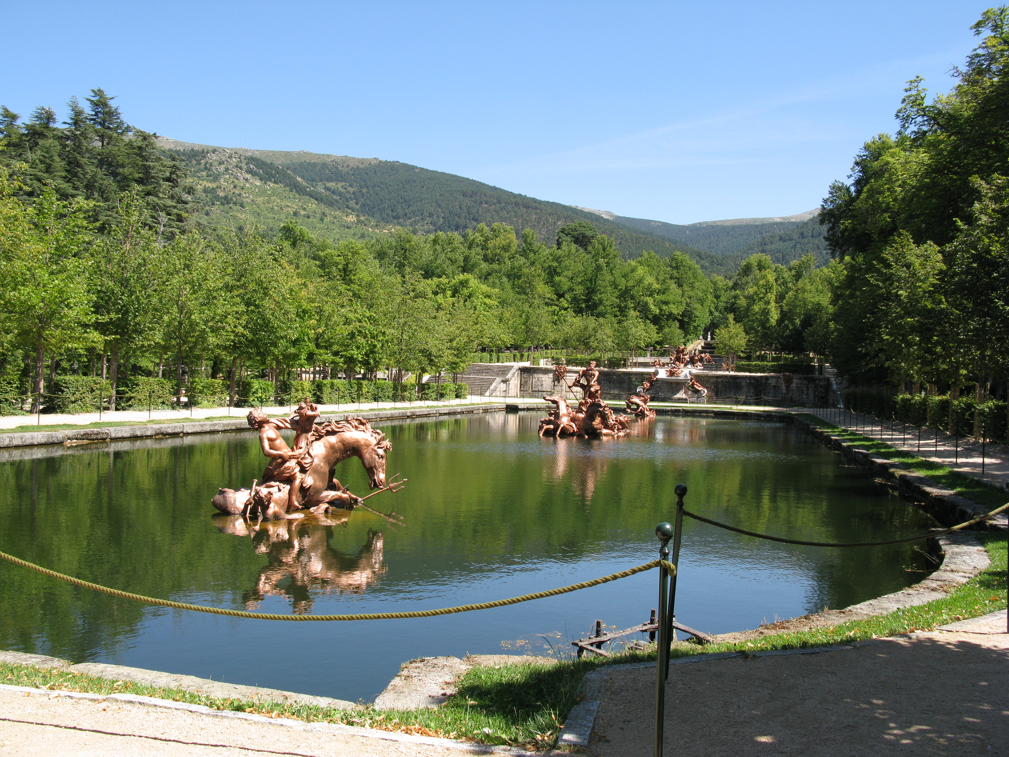 Jardines del Palacio Real de La Granja de San Ildefonso, Segovia (España)